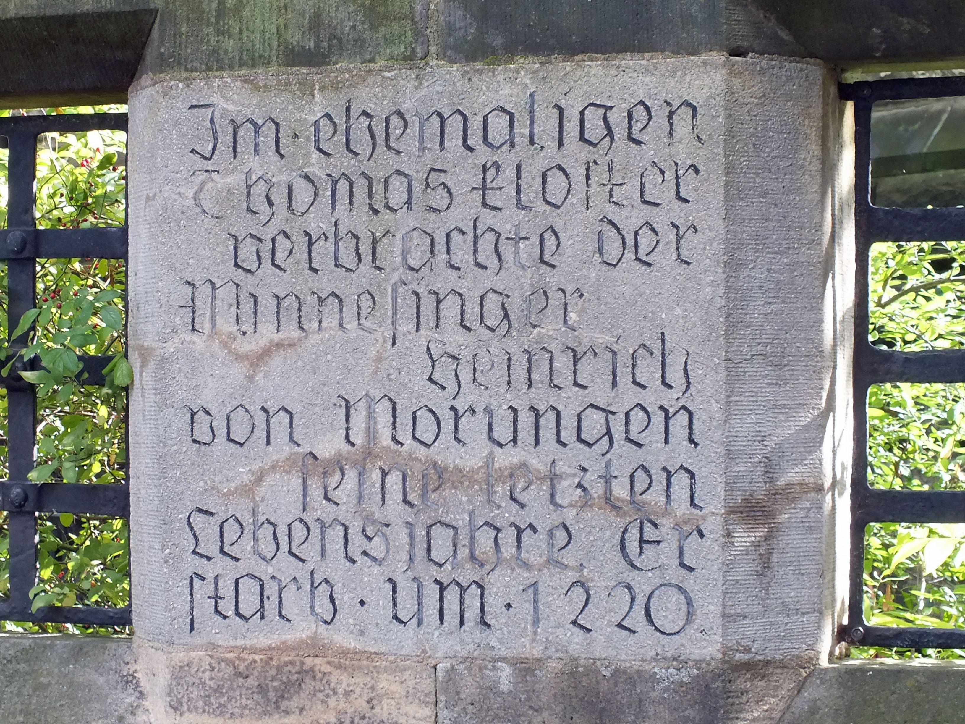 Gedenkstein an Heinrich von Morungen an der Umfriedung der Thomaskirche in Leipzig